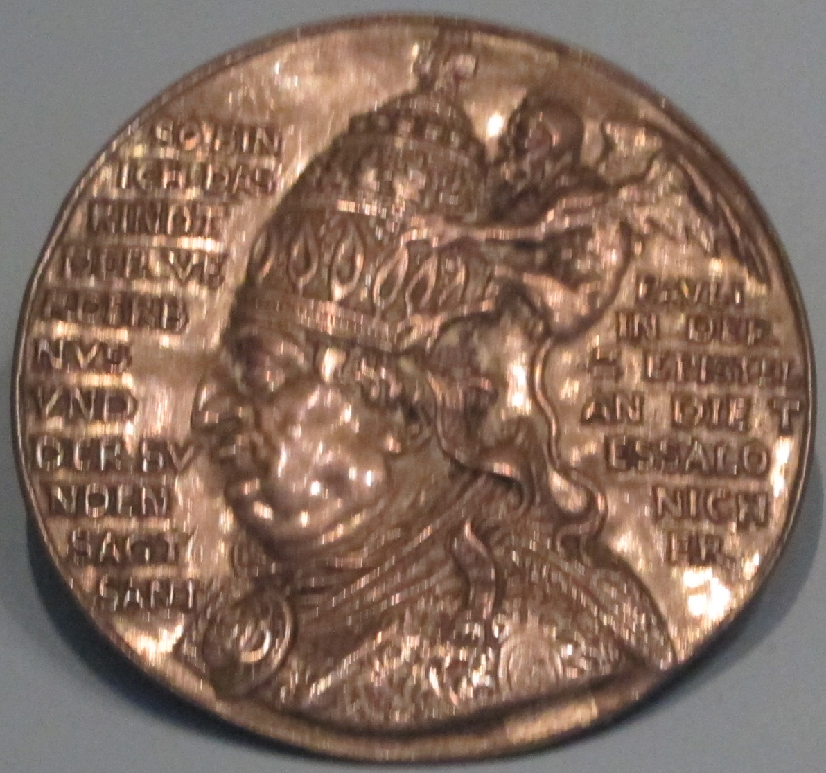 Peter flötner, medaglia satirica del papa, norimberga 1550 ca